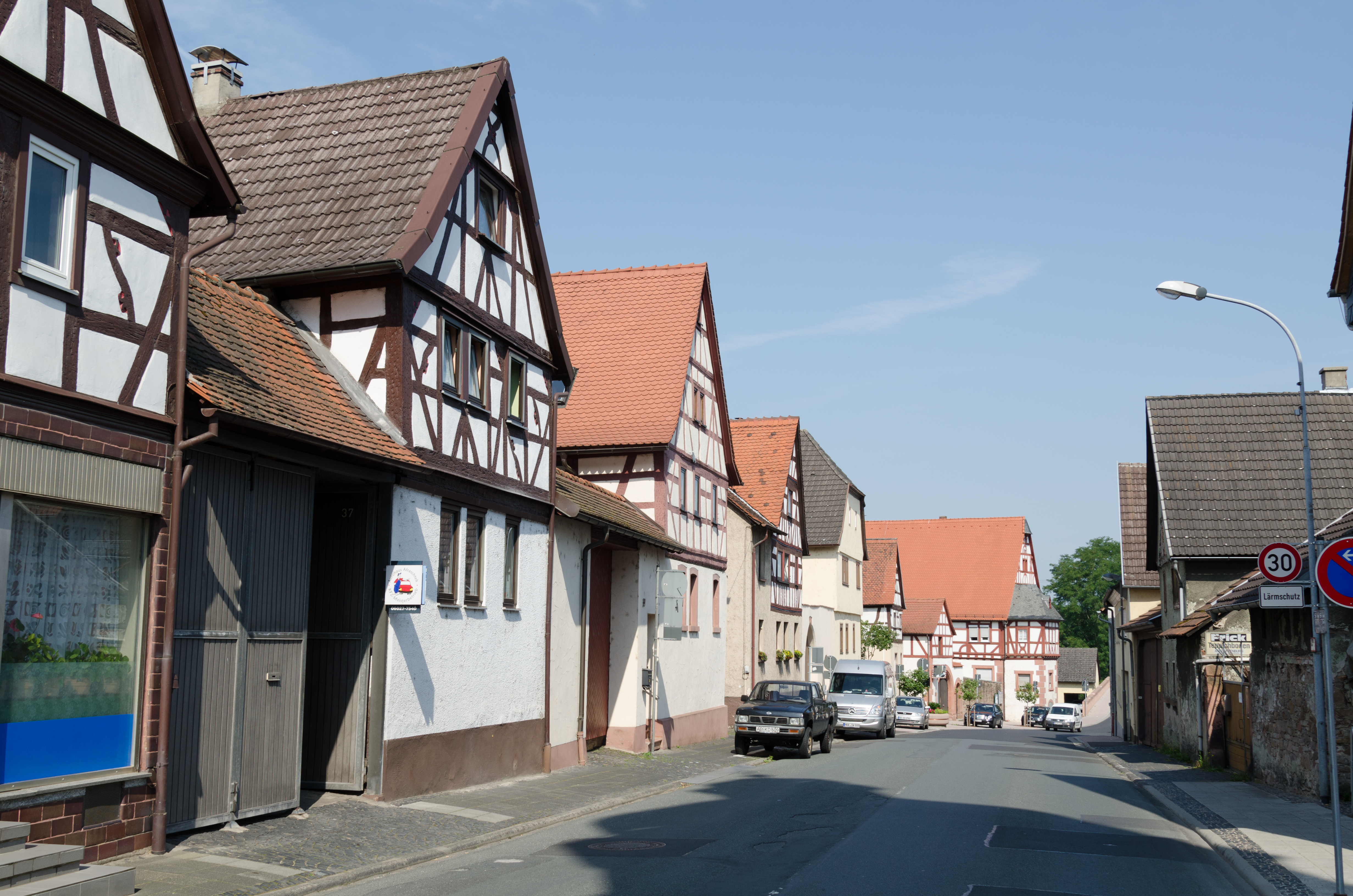 Stockstadt am Main, Ensemble Hauptstraße, Westseite